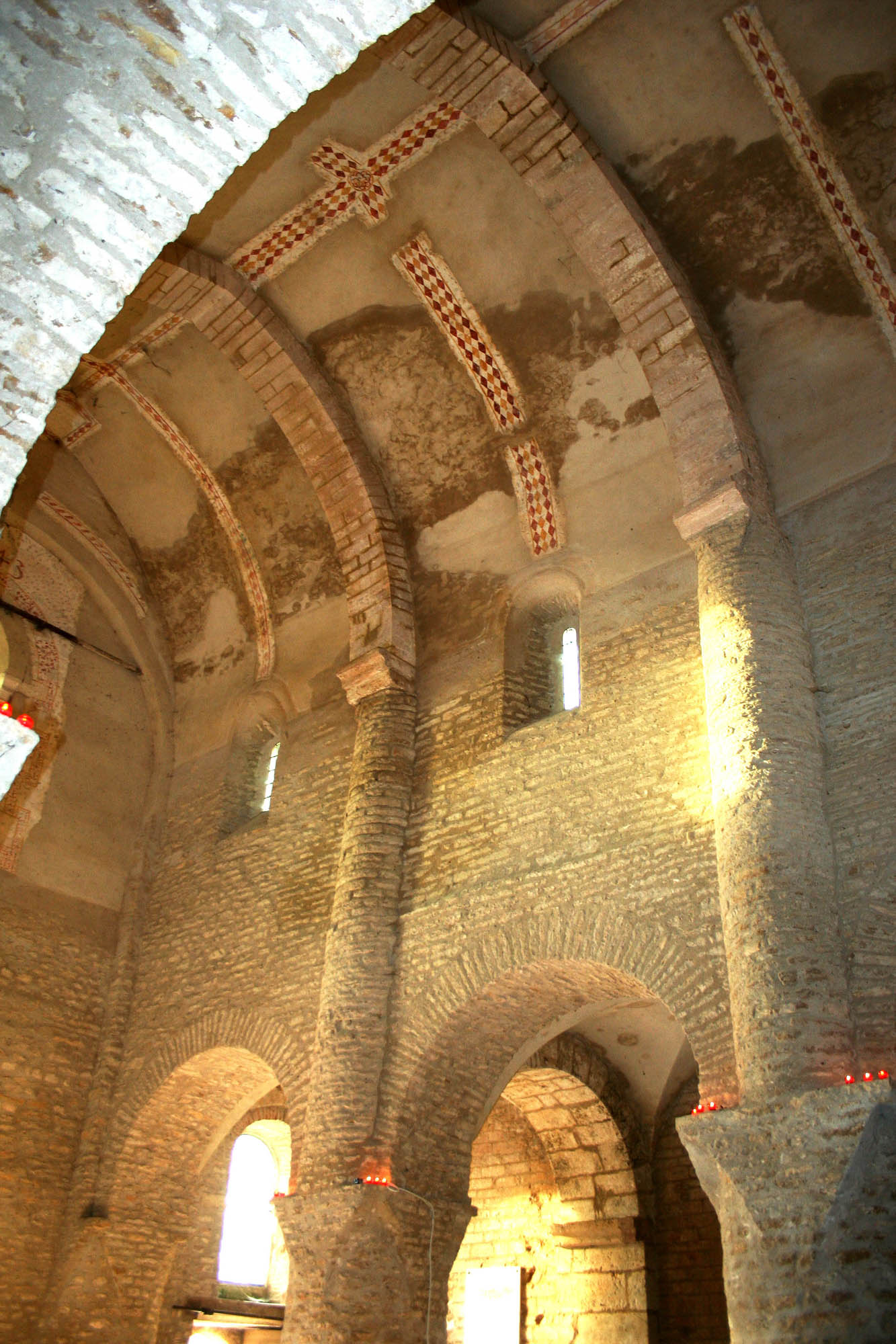 Nef de l'église Saint-Martin, Chapaize, Saône et Loire, Bourgogne, France